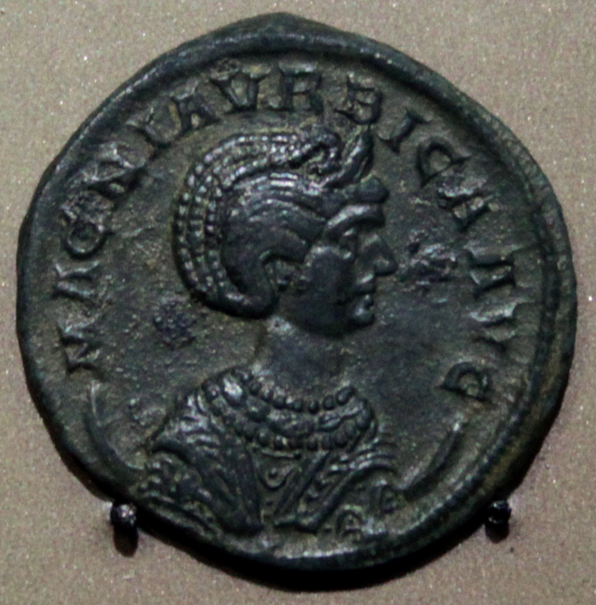 Antoniano de Magnia Urbica, años 282 al 285. Depositada en el Museo de prehistoria de Valencia, Comunidad valenciana, España.